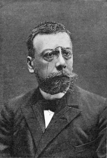 El eminente poeta catalán Angel Guimerá, autor del drama sacro Jesús de Nazareth, fotografía de Audouard.